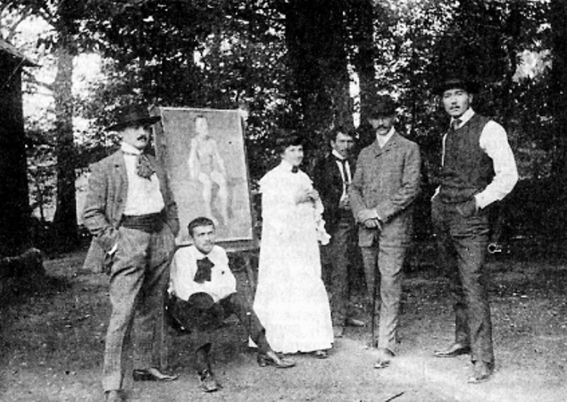 Csoportkép Nagybányán. Balról jobbra: Boromisza Tibor, Jakab Zoltán, (?), Perlrott-Csaba Vilmos, Börtsök Samu, Réthy Károly.